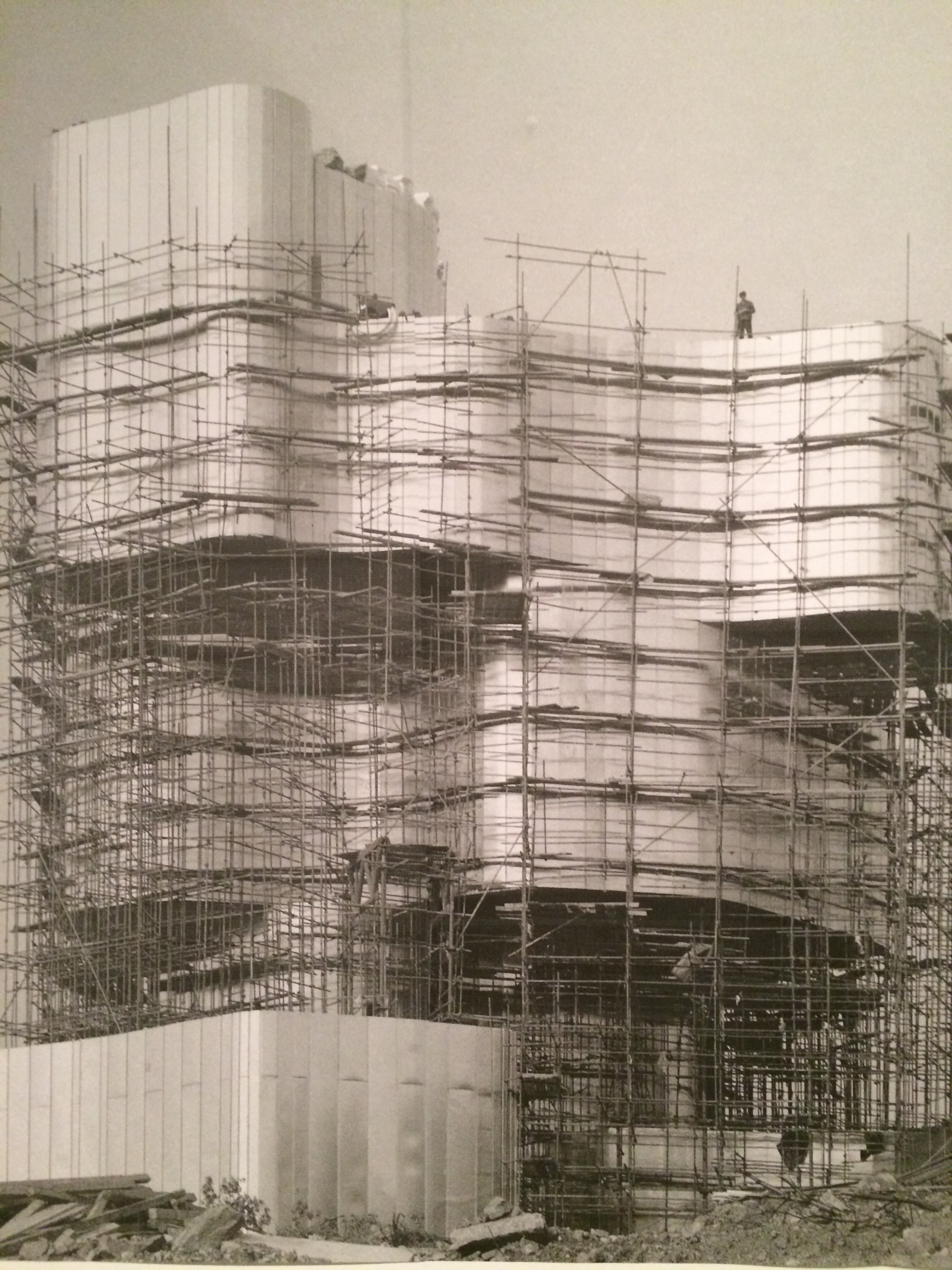 Srpskohrvatski / српскохрватски: Izgradnja spomenika na Petrovoj gori, izložak na "Retrospektivi Vojina Bakića" u MSU Zagreb